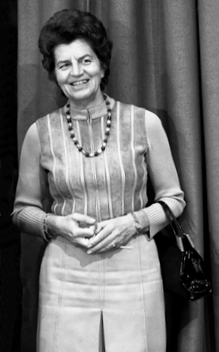 28. Ordentlicher Bundesparteitag der FDP in der Kieler Ostseehalle. (Lieselotte Funcke) 6.-8.11.1977